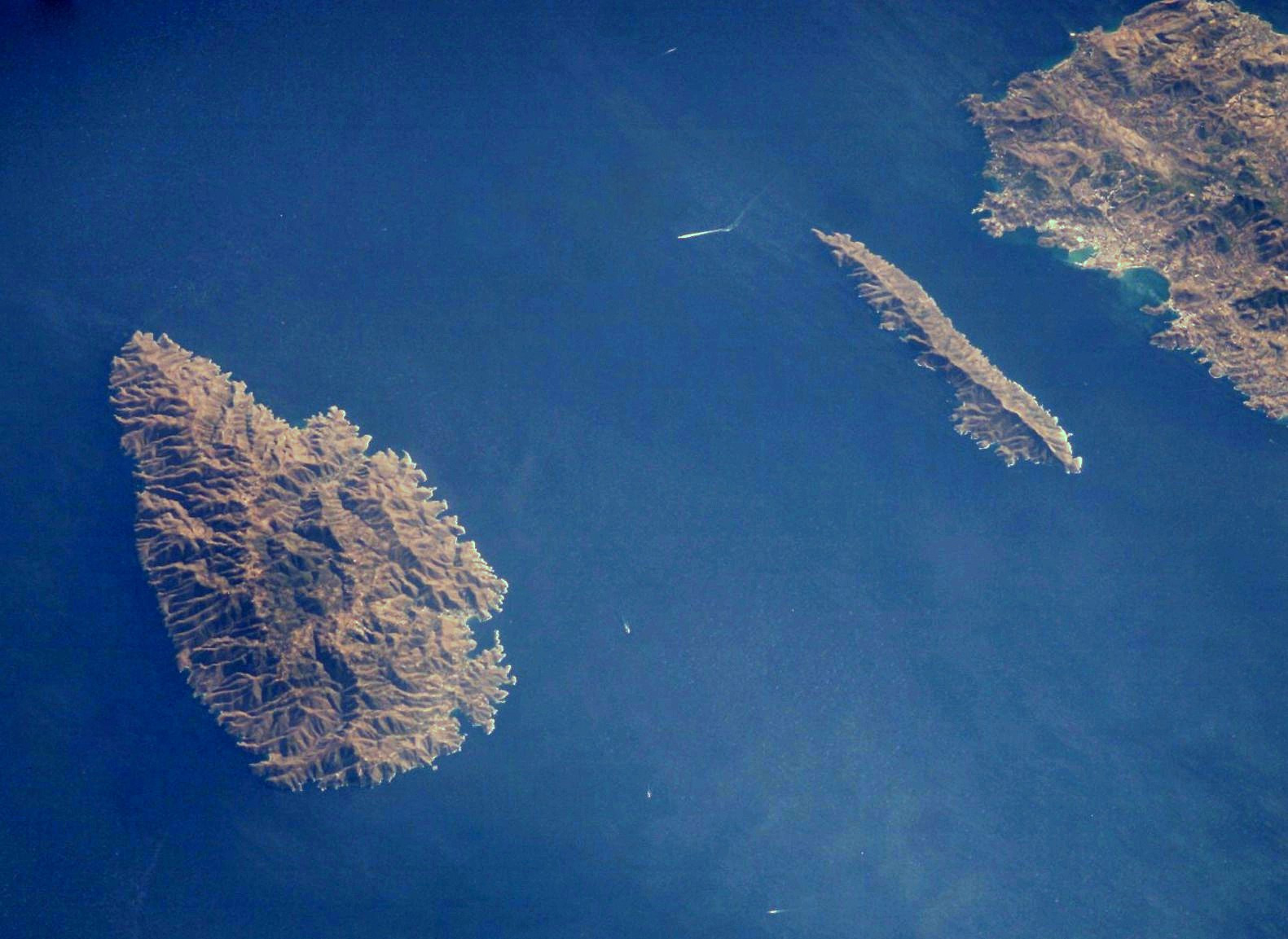 Photographie de Kéa et Makronissos depuis la Station Spatiale Internationale - Résolution supérieure.